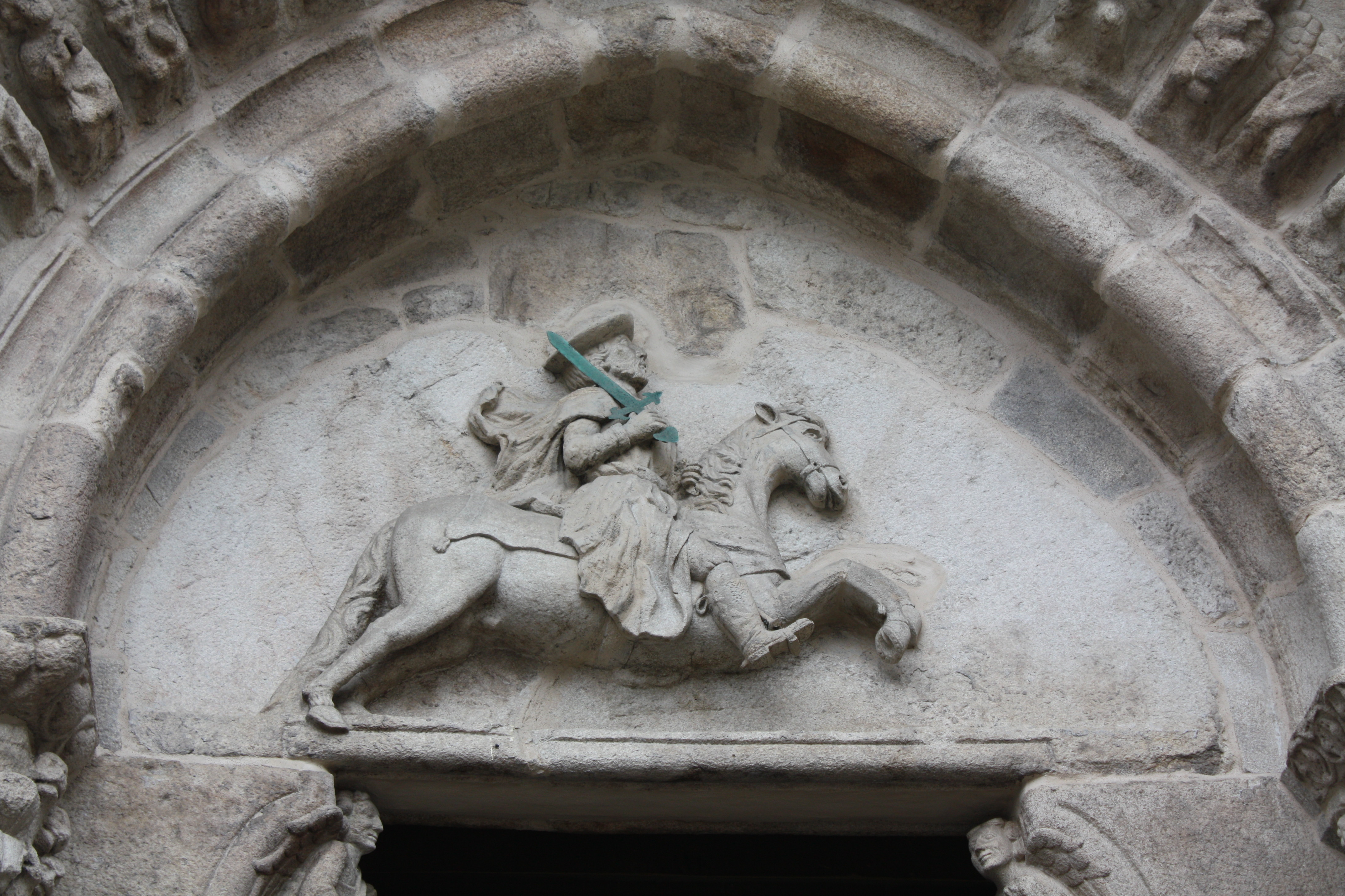 Igrexa de Santiago (A Coruña)